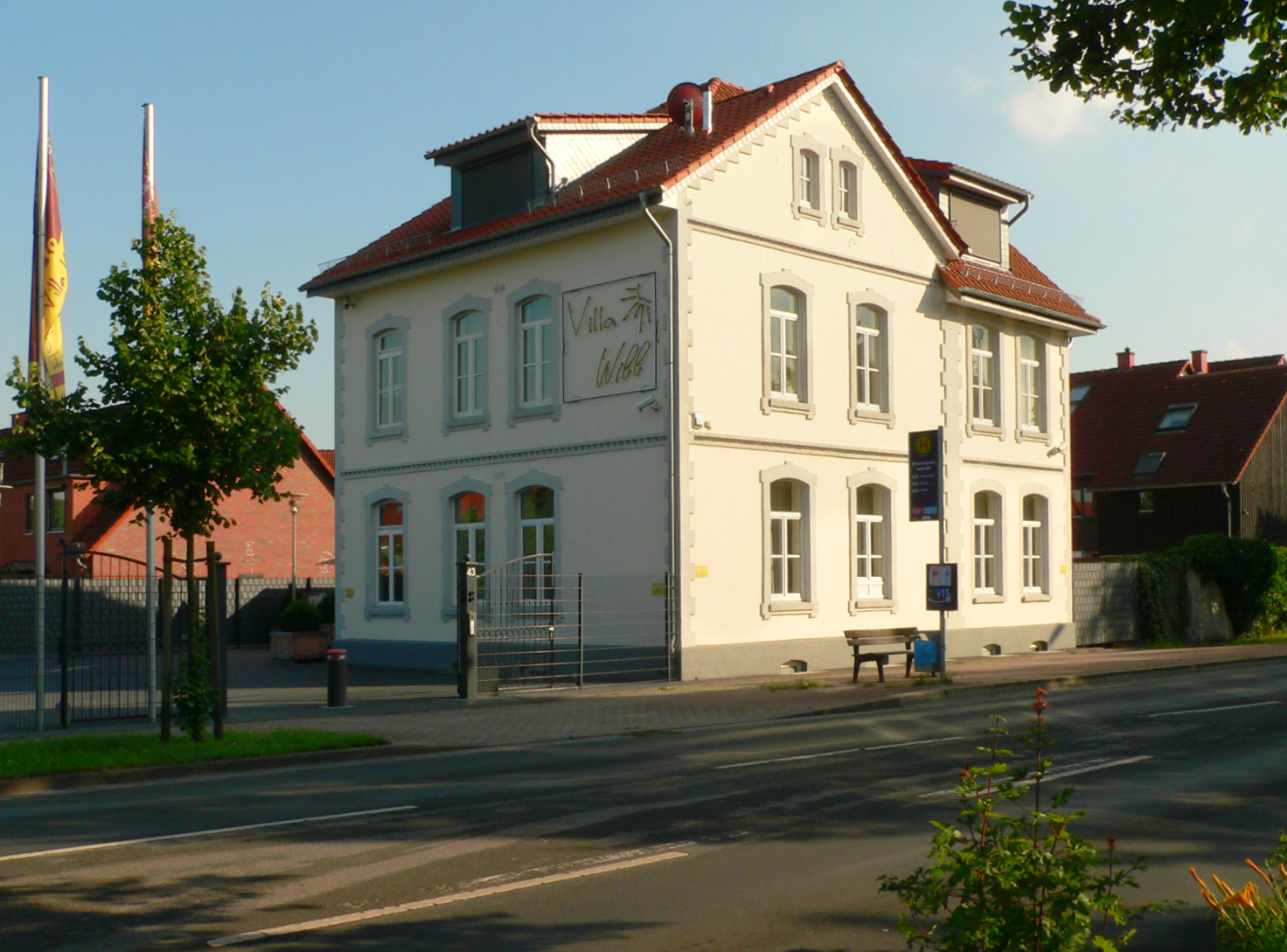 Früheres Meisterhaus der Flemmingschen Tonkuhle in Altwarmbüchen